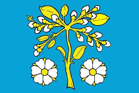 vlajka, Jívoví, okres Žďár nad Sázavou